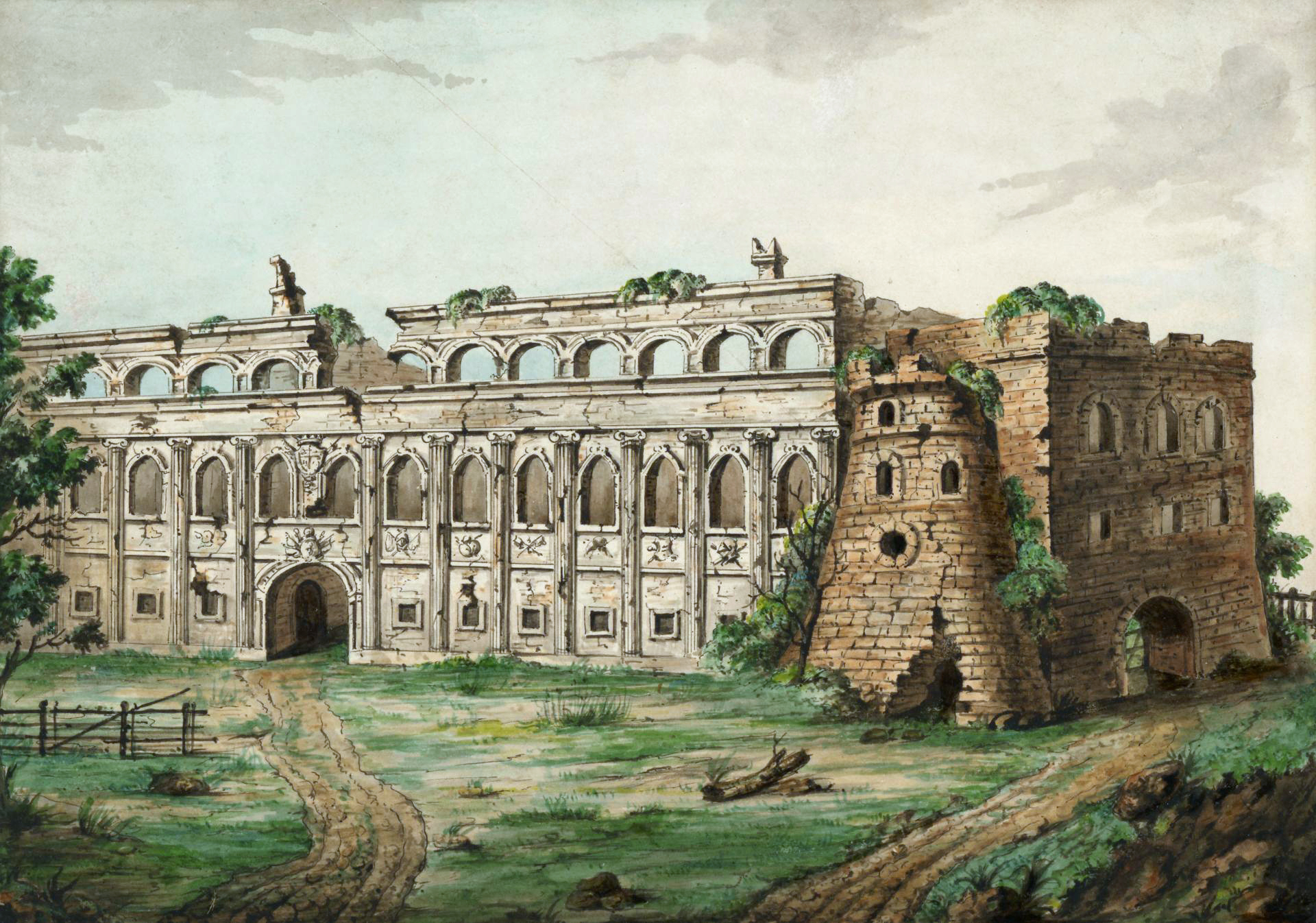 Беларуская (тарашкевіца): Вільня (Vilnia), Пушкарня (Puškarnia), руіны палаца Радзівілаў (Radzivił)